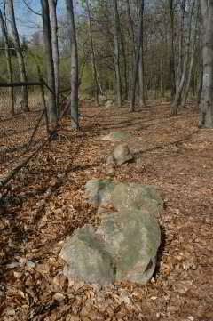 Příklad kounovských kamenů z roku 2004